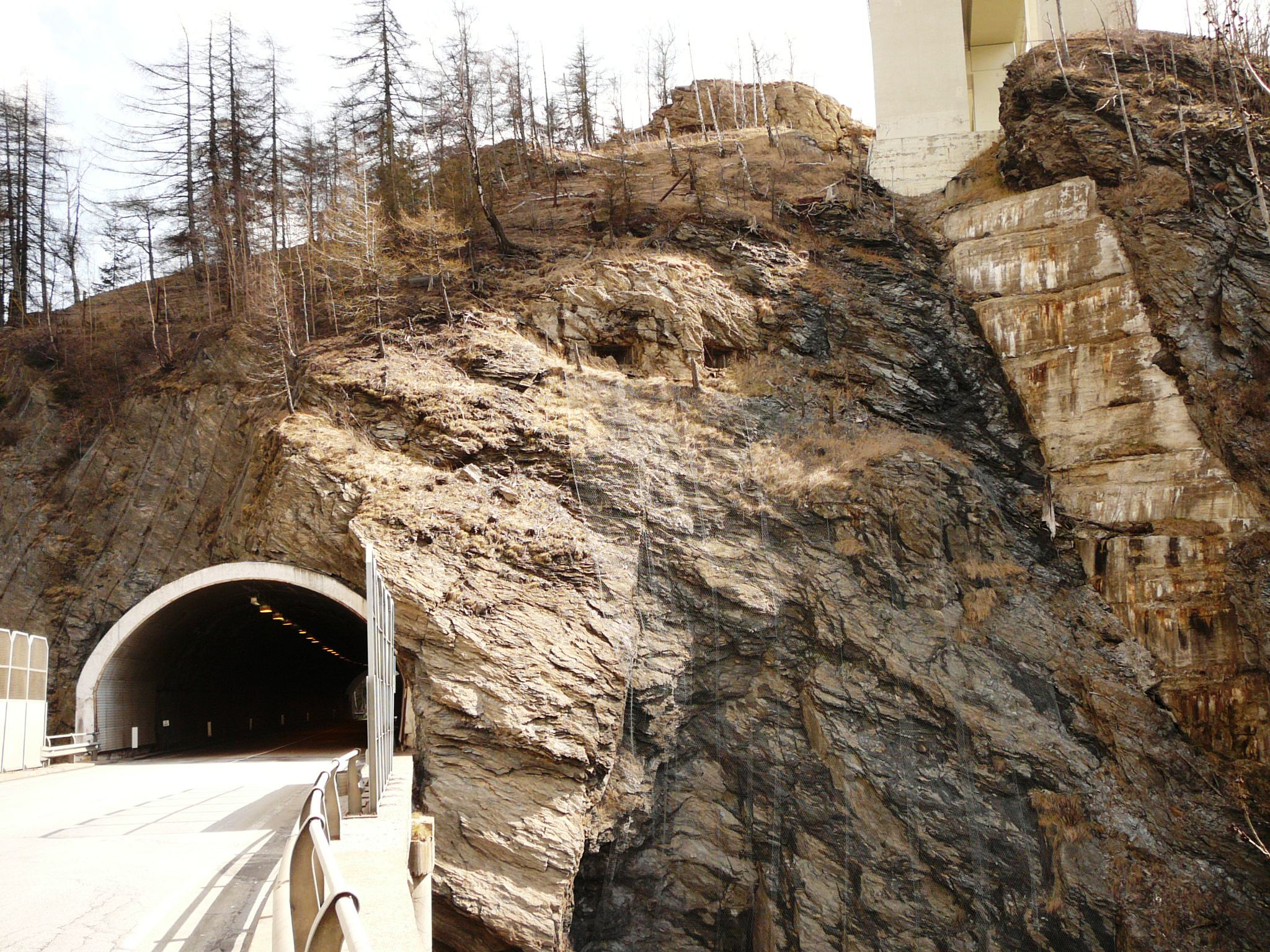 Opera 6 , sbarramento tenne